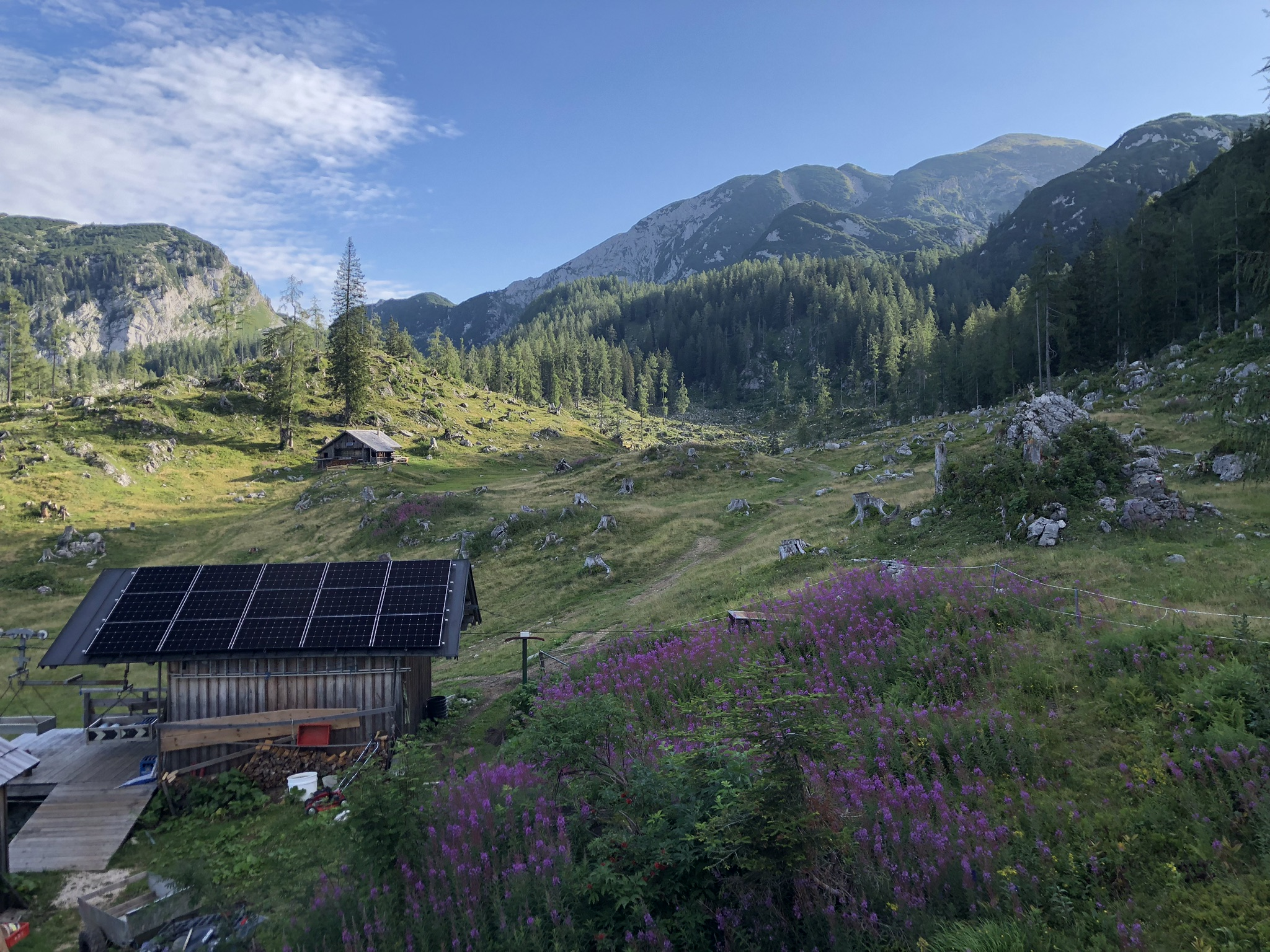 Etappe 5 des Welser Höhenweges: Die Ischleralm, im Hintergrund der Schönberg (2090 m)